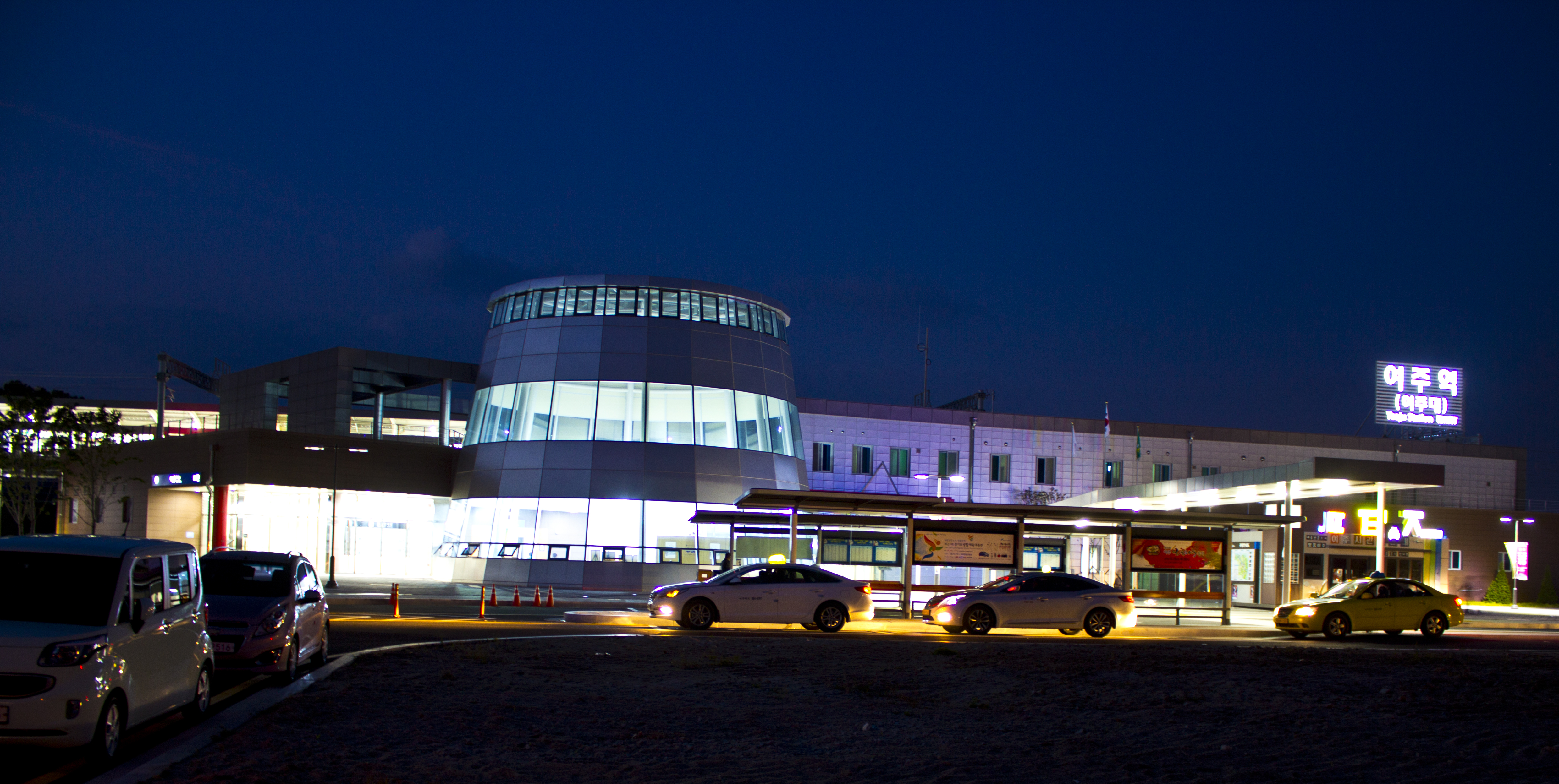 경강선 역사 외부 (야간)